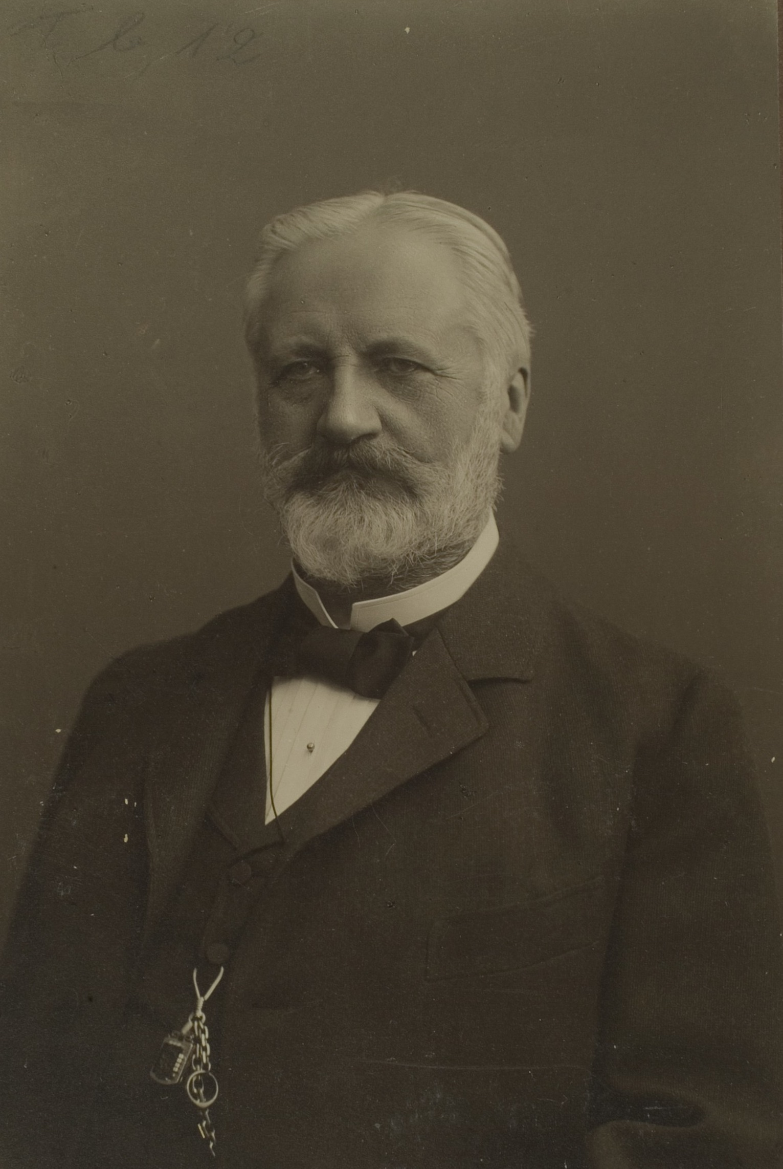 Ernst Immanuel Bekker, Jurist, 1874–1916 Professor in Heidelberg